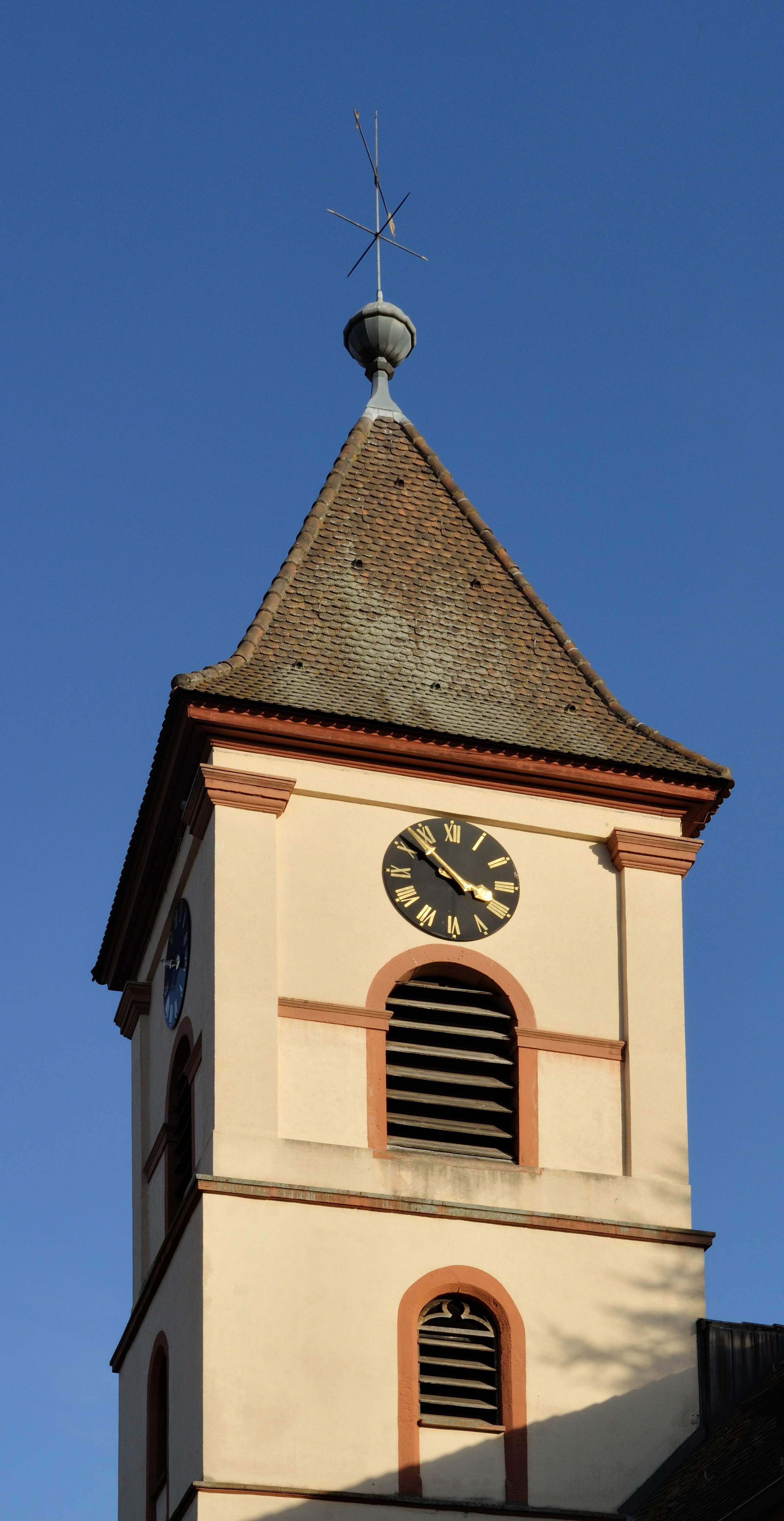 Kandern-Wollbach: Evangelische Kirche, Glockenturm